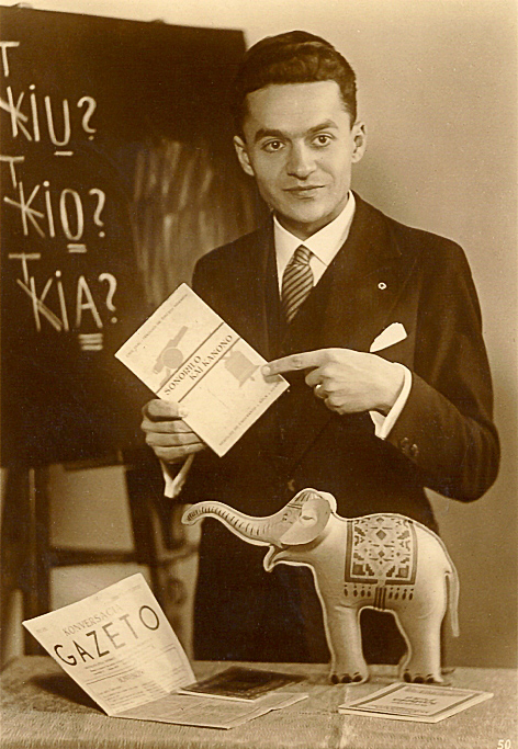 Tiberio Morariu, um 1930. Unterrichtssituation in einem "Cseh-Kurs" auf Ansichtskarte